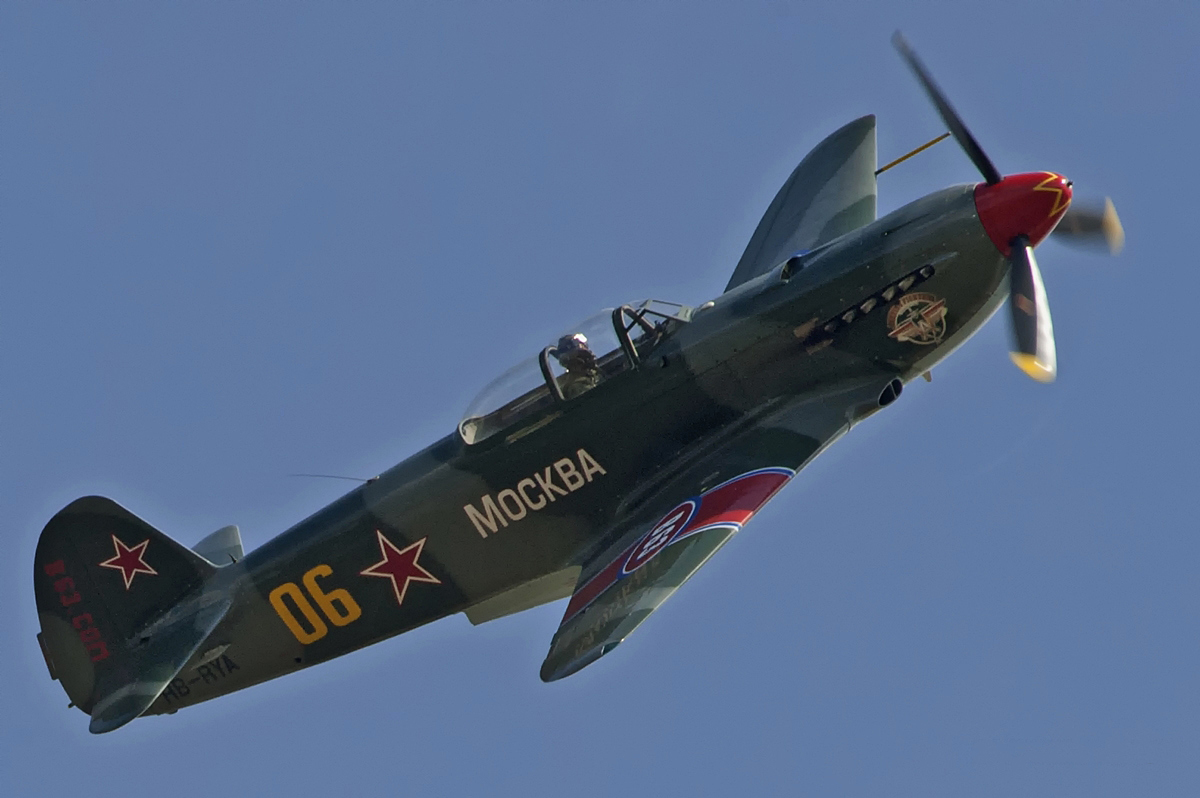 Flight! Yakovlev Yak-9UM HB-RYA